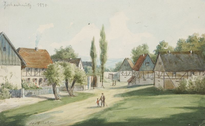 Zschachwitz, 1870; Watercolours, 15.7 x 25 cm.